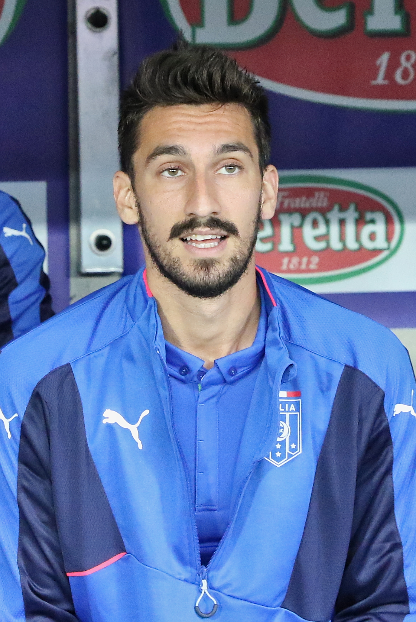 20150616 - Portugal - Italie - Genève - Davide Astori